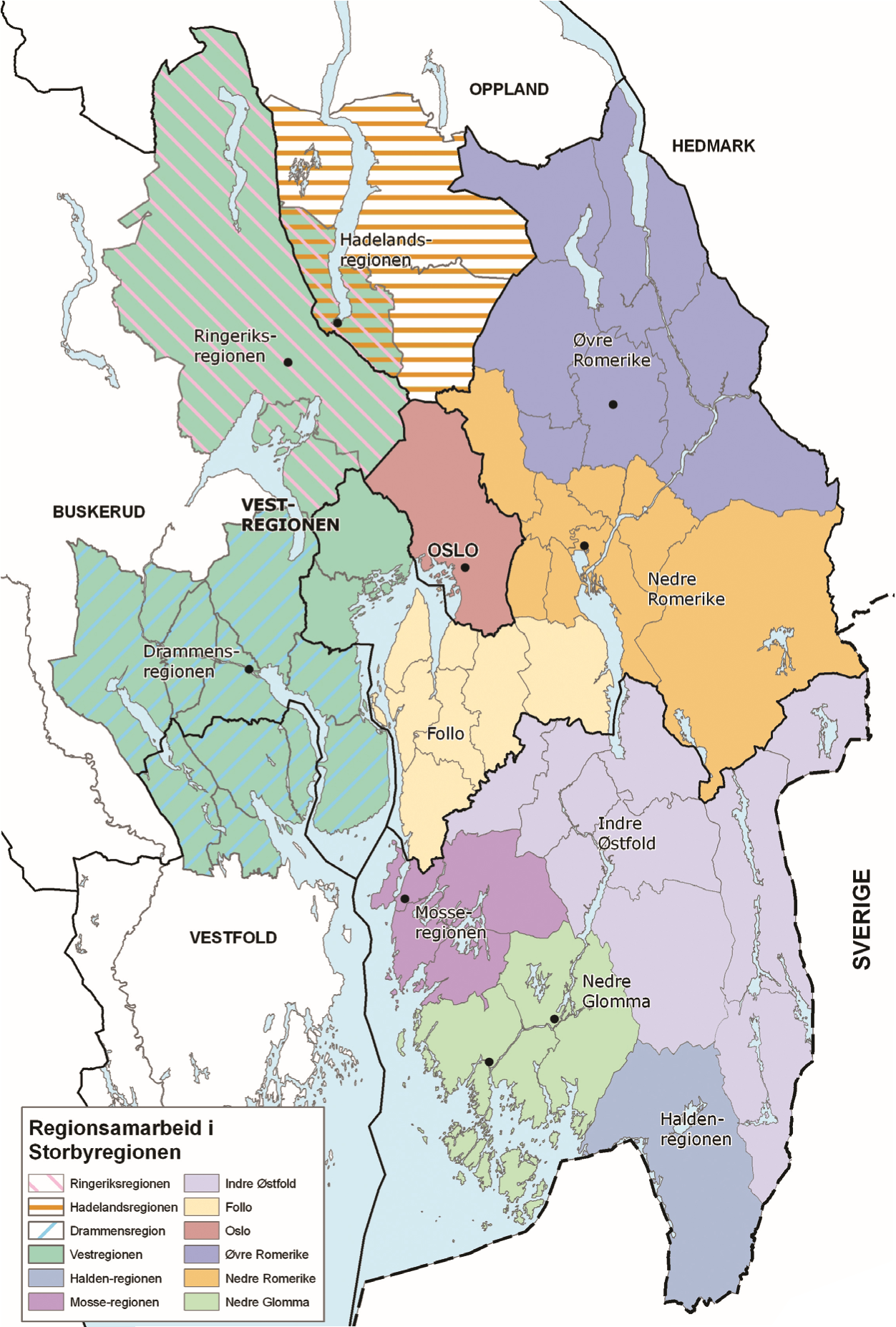 Kart fra St.meld. nr. 31 (2006-2007). Kartet viser en funksjonell inndeling av Osloregionen etter regionsamarbeid i diverse byregioner som regnes som en del av storbyregionen kjent som Osloregionen.